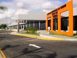 Fachada Principal del Aeropuerto Internacional Manuel Carlos Piar